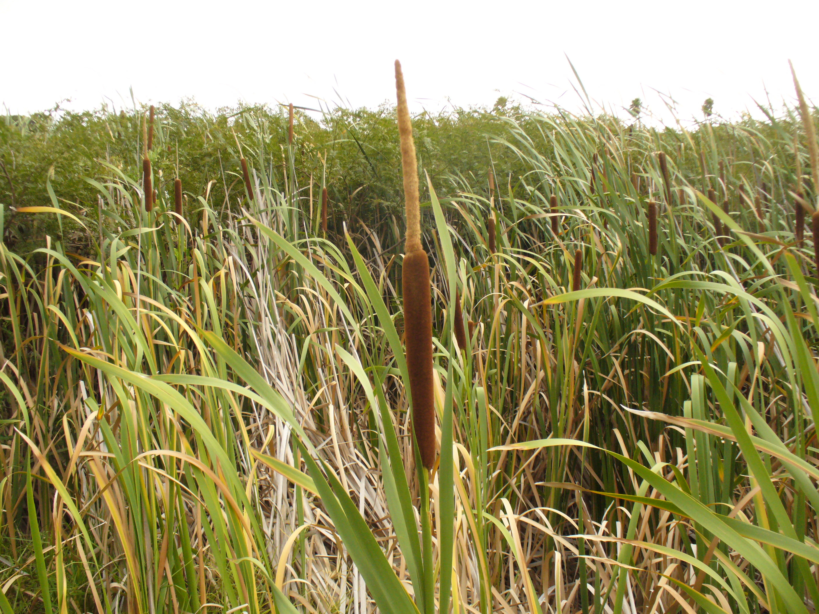 Cape Bulrush